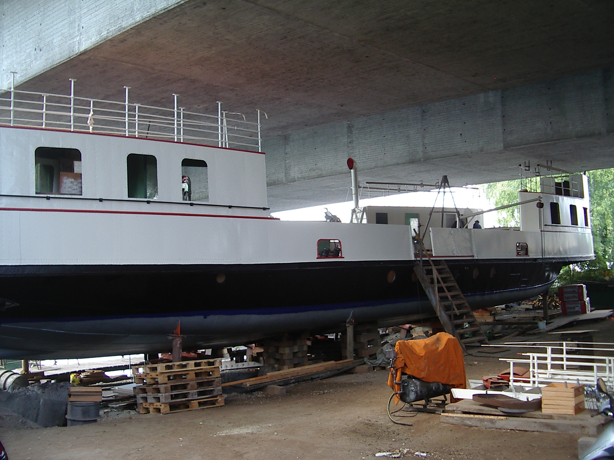 Ehemalige Bodenseefähre Meersburg während der Renovierung